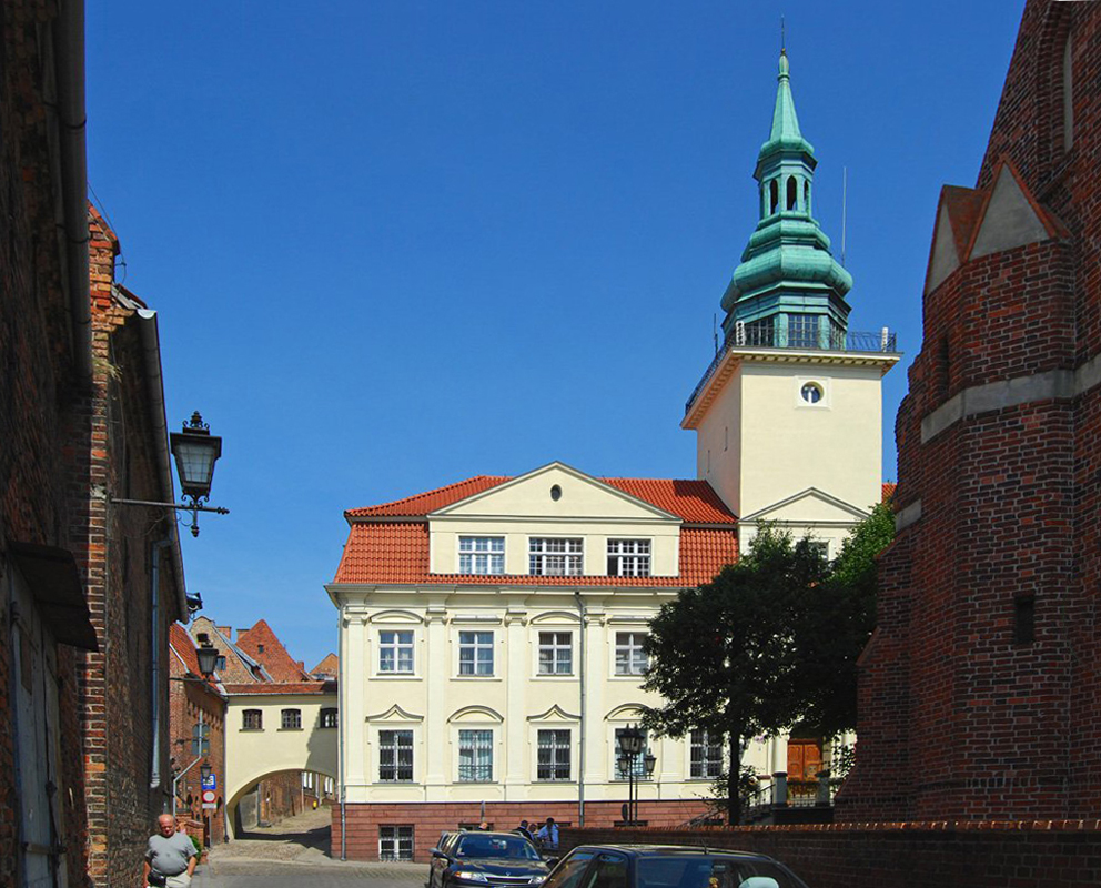 Grudziądz, kolegium jezuickie, ob. UM, 1647-1684, 1722-1725, XX